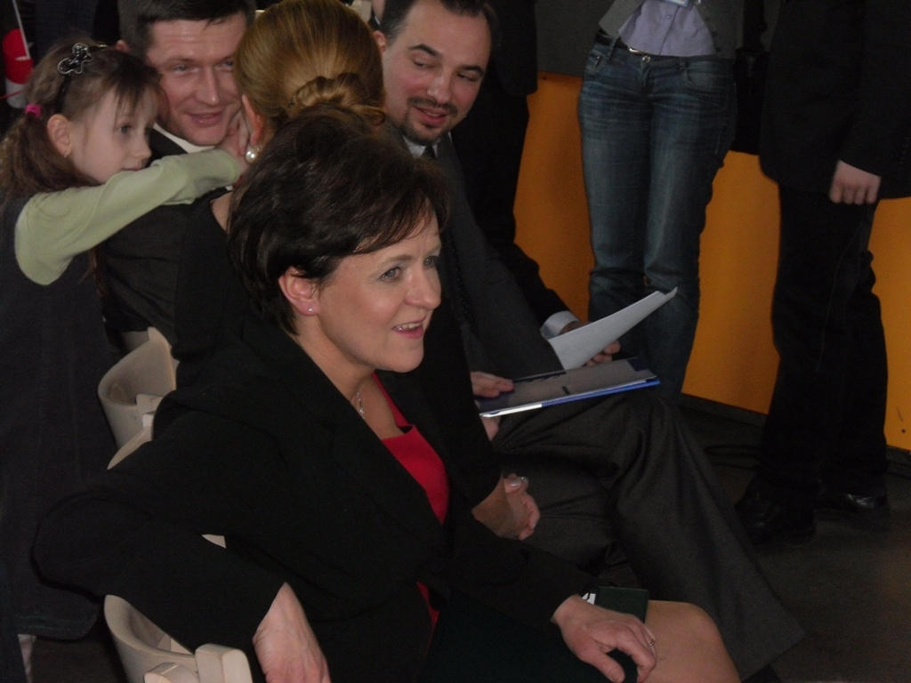 Zdjęcie zrobione podczas śląskiej konferencji PJN (Polska jest Najważniejsza) na rondzie gen. Jerzego Ziętka w Katowicach.